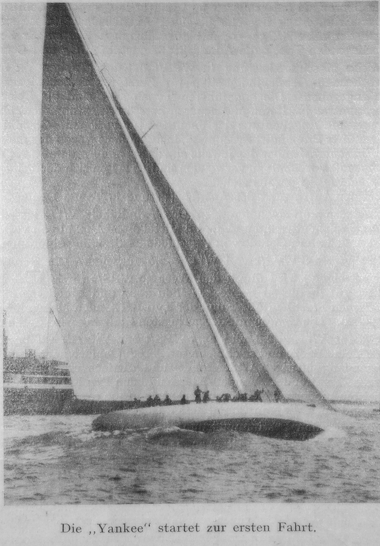 Aunahme der Bostoner Yacht Yankee aus der Fachzeitschrift "Werft*Reederei*Hafen" von 1935